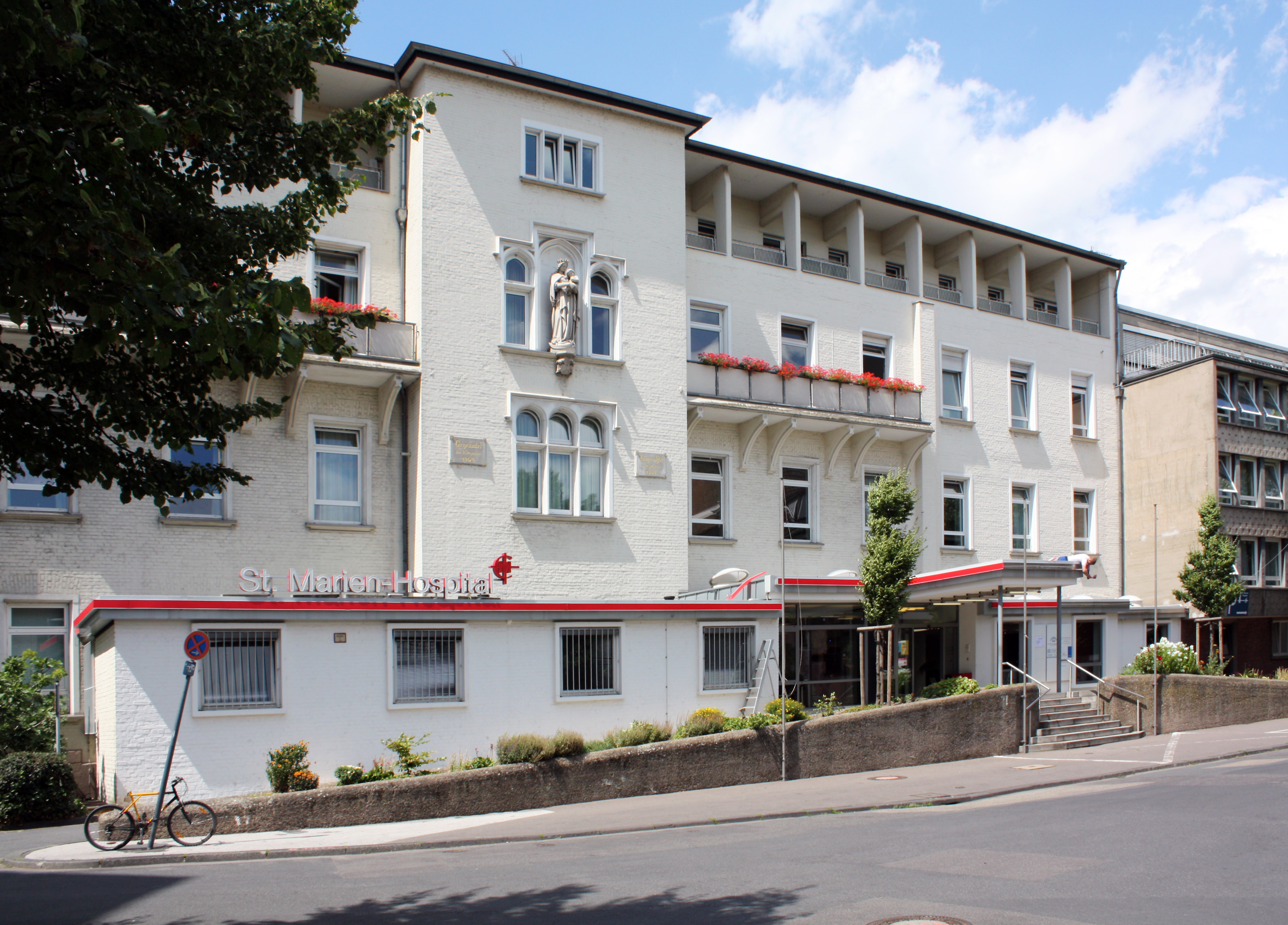 St. Marien-Hospital Köln